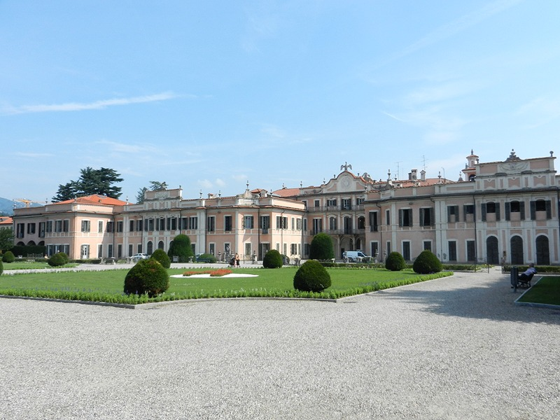 Varese - Palazzo Estense visto dai Giardini